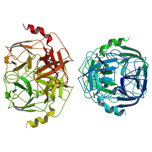 Proteinase §